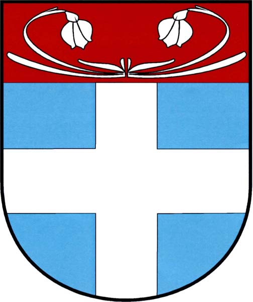 Znak obce Zahrádky (okres Česká Lípa)